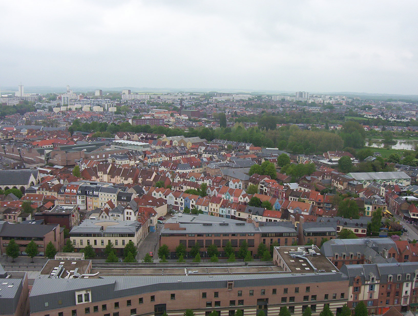 Amiens - Vue vers le nord depuis les tours de Notre-Dame : Saint-Leu.